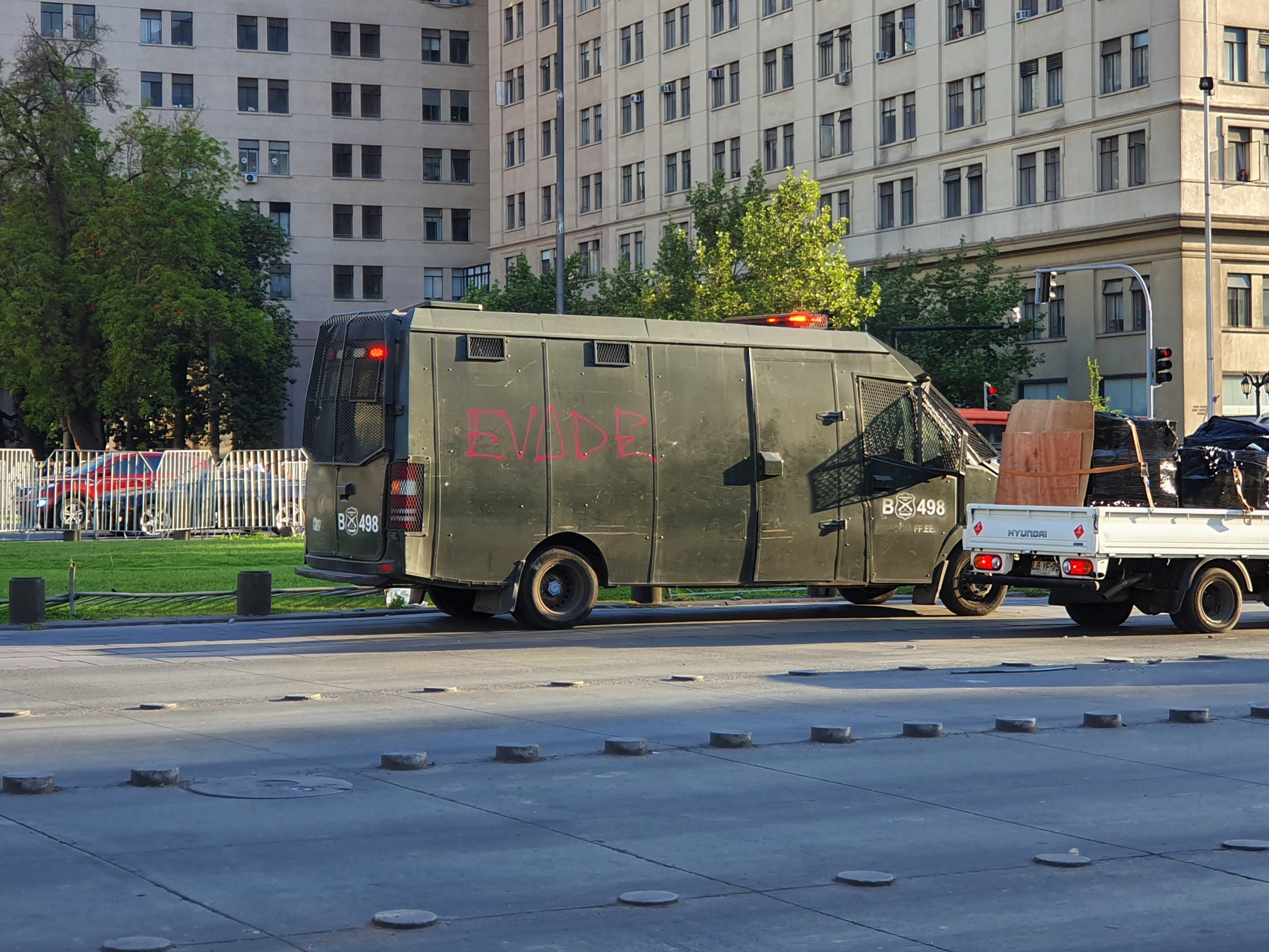 Vehículo de Carabineros de Chile con un rayado de "Evade", durante las protestas de 2019 en Santiago, Chile.